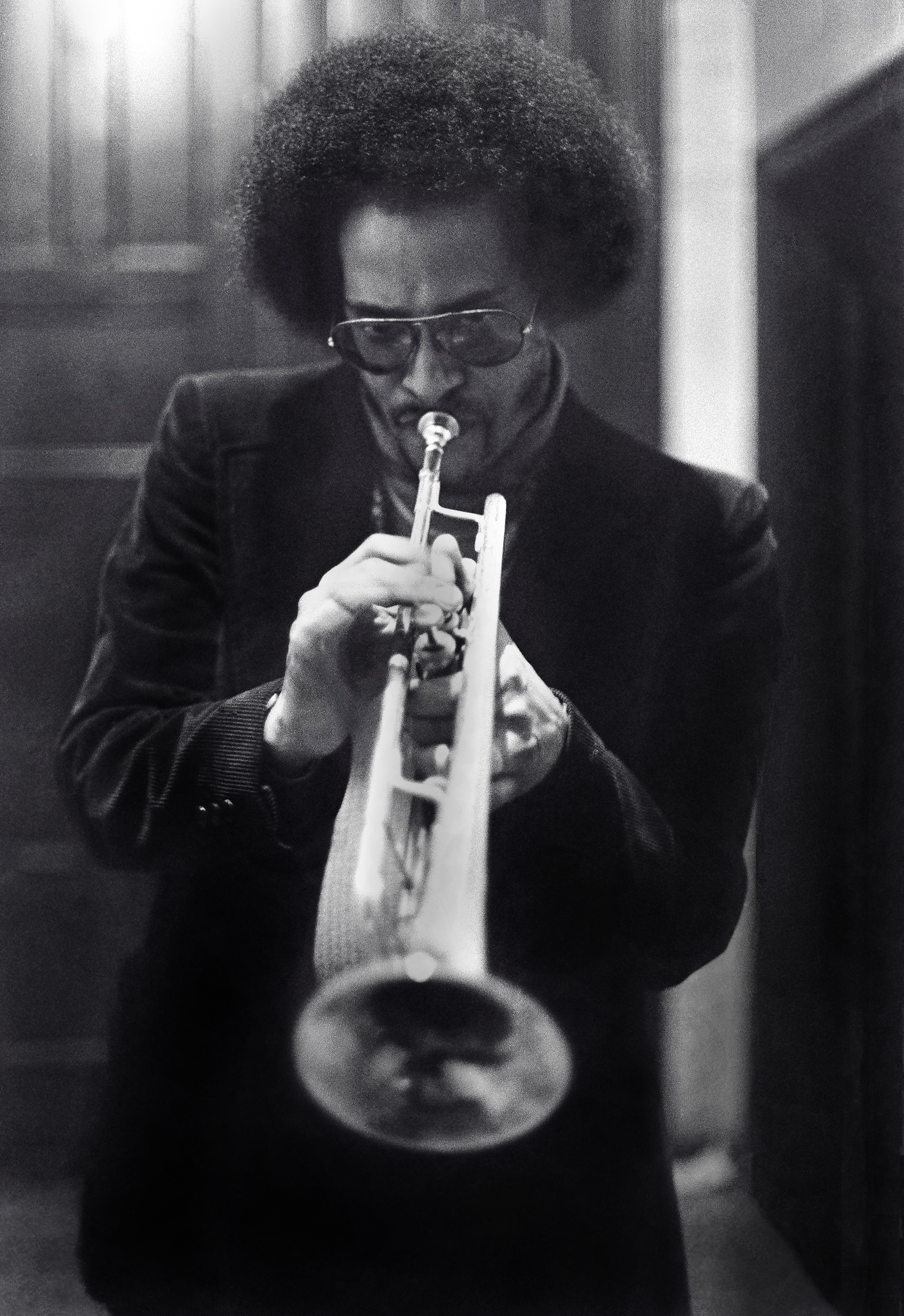 Rochester, N.Y. 1978